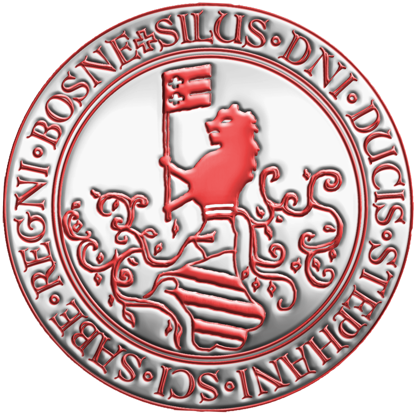 Rekonstrukcija grba Kosača sa pečata Vlatka Kosače na priznanici od 26. jula 1470. godine.)